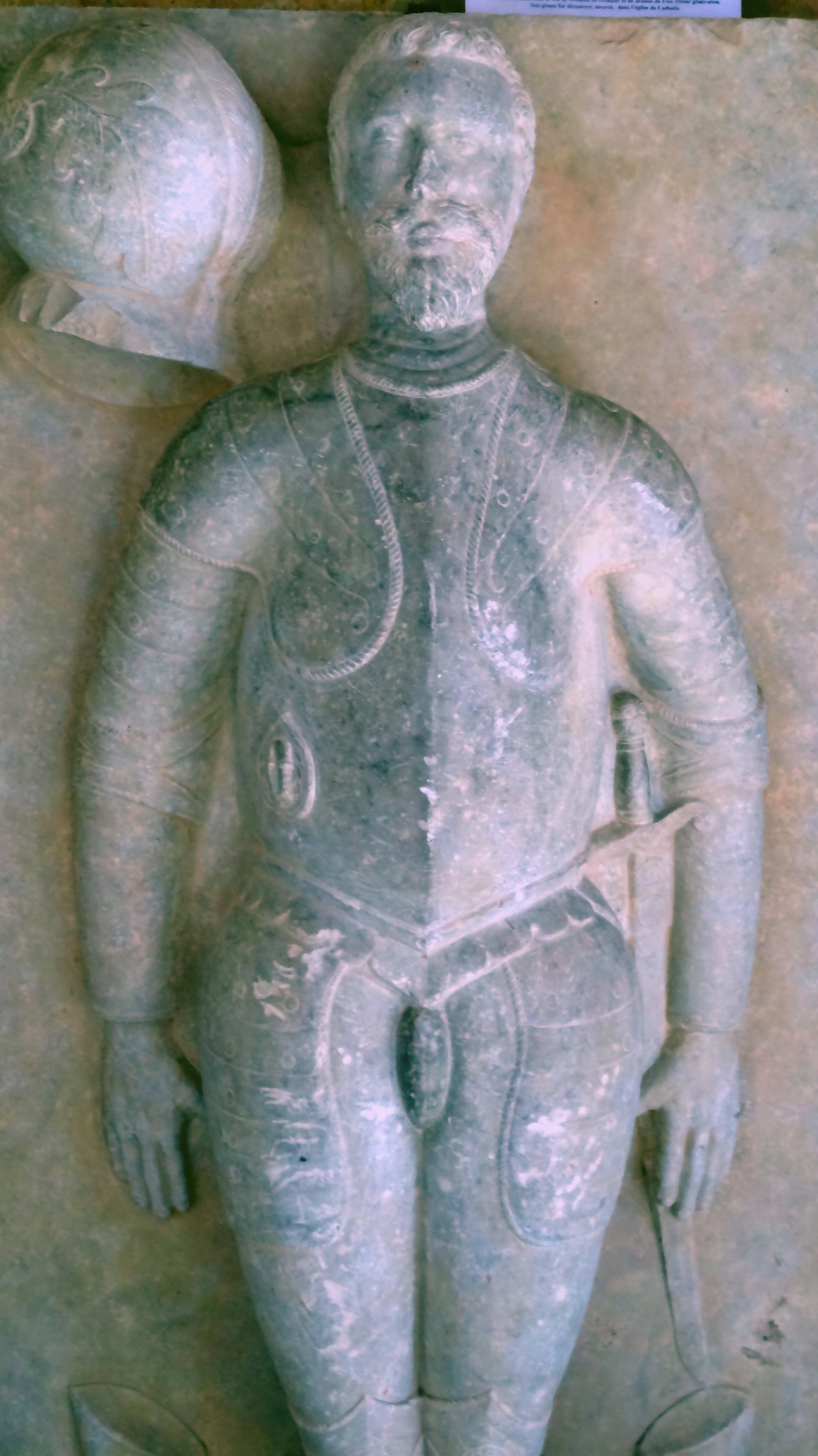 Gisant d'Hélie de Gontaut de Saint-Geniès (mort en 1598); déposé dans la chapelle de château de Biron (Dordogne)